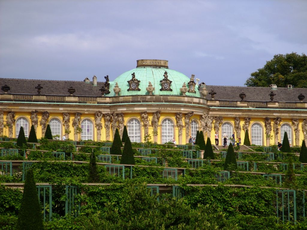 Das Schloss steht in Potsdam. Es gehörte dem ehemaligen König.